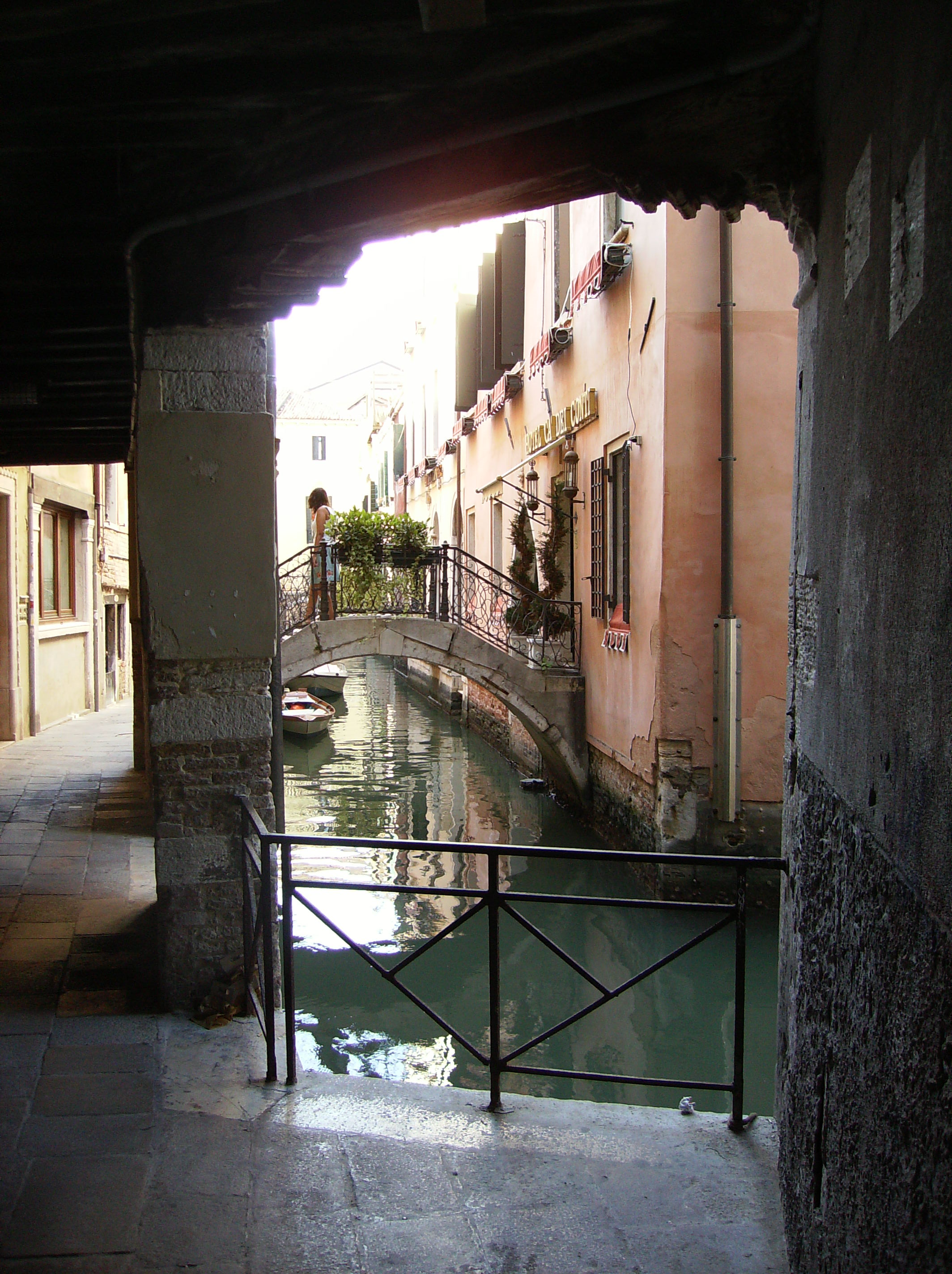 rio del rimedio